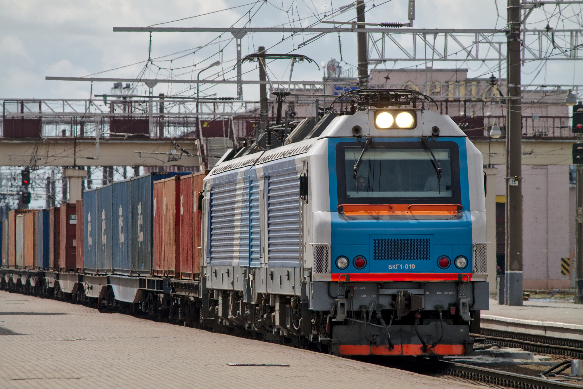 БКГ1-010, Орша-центральная. см. фото 601668 в альбоме автора